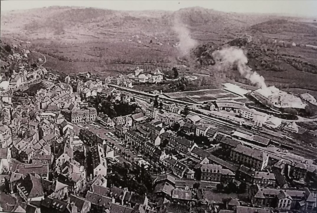 Ville de Murat